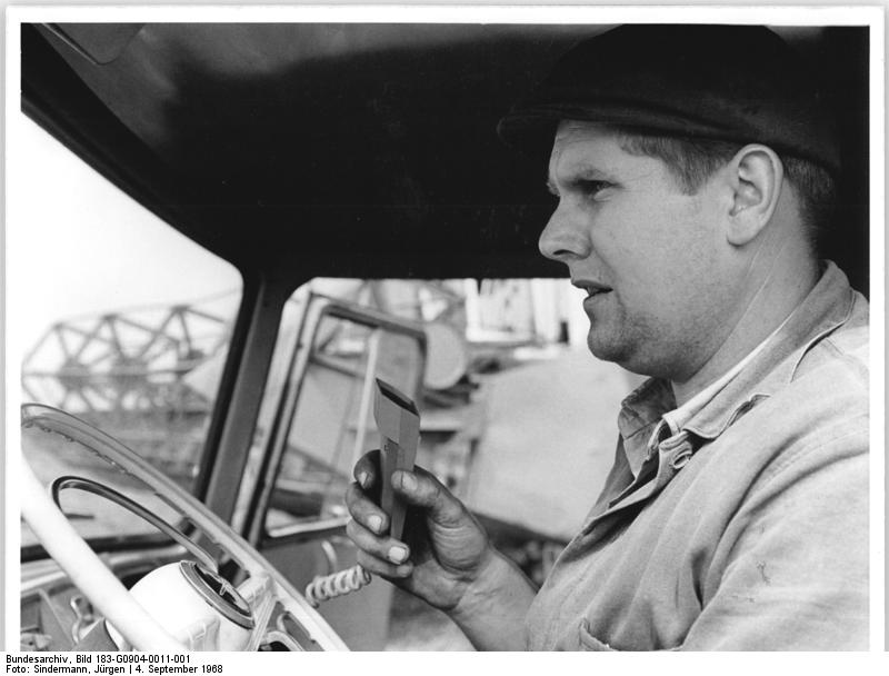 Traktorist mit Funkanlage Zentralbild Sidermann 4.9.68 Rostock: Landwitschaftsbetriebe des Kreises Ribnitz-Damgarten über UKW-Sprechfunk miteinander verbunden Ein System von UKW-Sprechfunkverbindungen wurde zwischen allen Landwirschaftsbetrieben des Kreises Ribnitz-Damgarten geschaffen. Es hat sich während der diesjährigen Getreideernte bereits bewährt. Landmaschinen- und Traktorenschlösser Uwe Kleider kann über eine der insgesamt 60 mobilen- zumeist in LKW und anderen Betriebsfahrzeugen installierten - Anlagen bei dringenden Reparaturen in kürzester Zeit herbeigerufen werden und helfen. Das UKW-Sprechfunksystem wurde von einer sozialistischen Arbeitsgemeinschaft des Kreisbetriebes für Landtechnik in Zusammenarbeit mit den größten Kooperationsbereichen des Kreises Ribnitz-Damgarten in zwei Monaten geschaffen. Es besteht aus insgesamt sechs festen Stationen und 60 mobilen Anlagen.